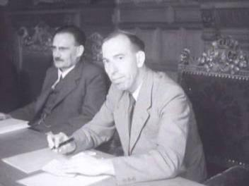 Hein Vos in 1946